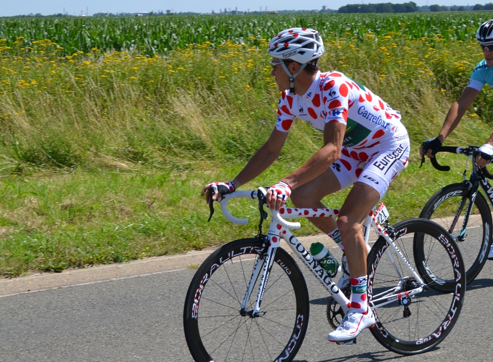 Thomas Voeckler TDF 2012